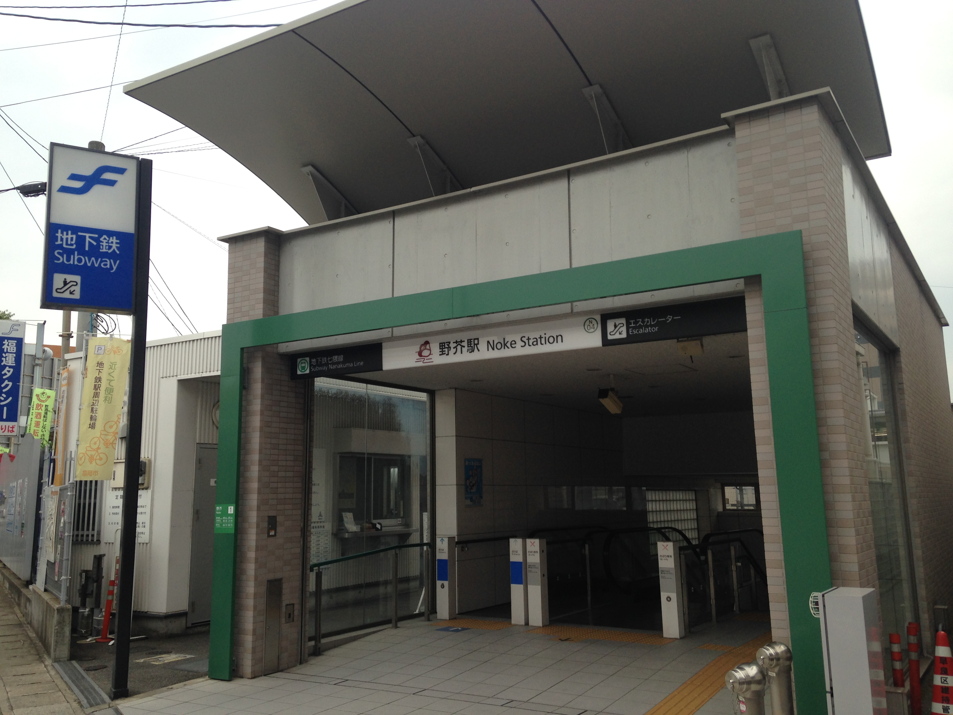 野芥駅の1番出入口